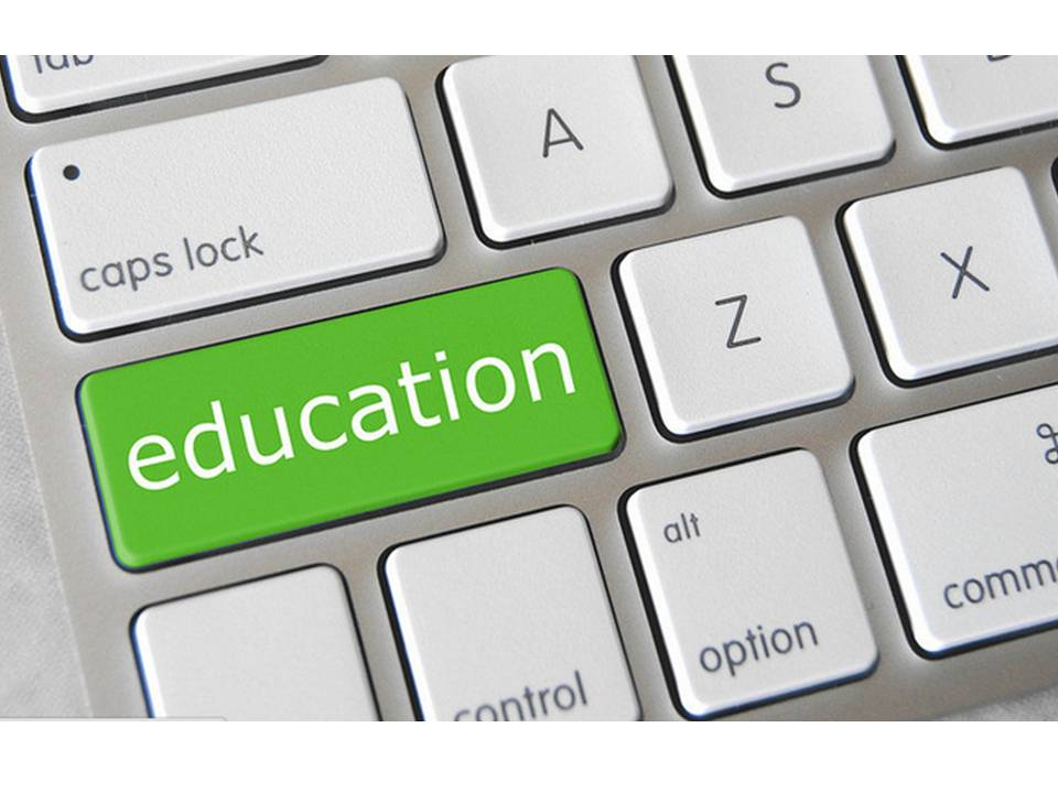 Education TIC